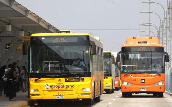 Vista buses alimentadores en estación Naranjal. Imagen Fuente: Diario La República